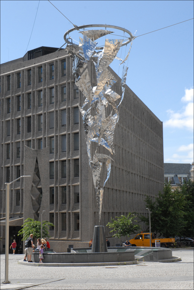 Sculpture en acier de 17 m de haut au centre de la place Saint-Olavs à Oslo (St. Olavs plass) dans un quartier chic proche du Palais royal. Le cabinet norvégien d'architectes Aspaas, Cooper Kind AS et le Suédois Sven Pahlsson ont contribué au projet.